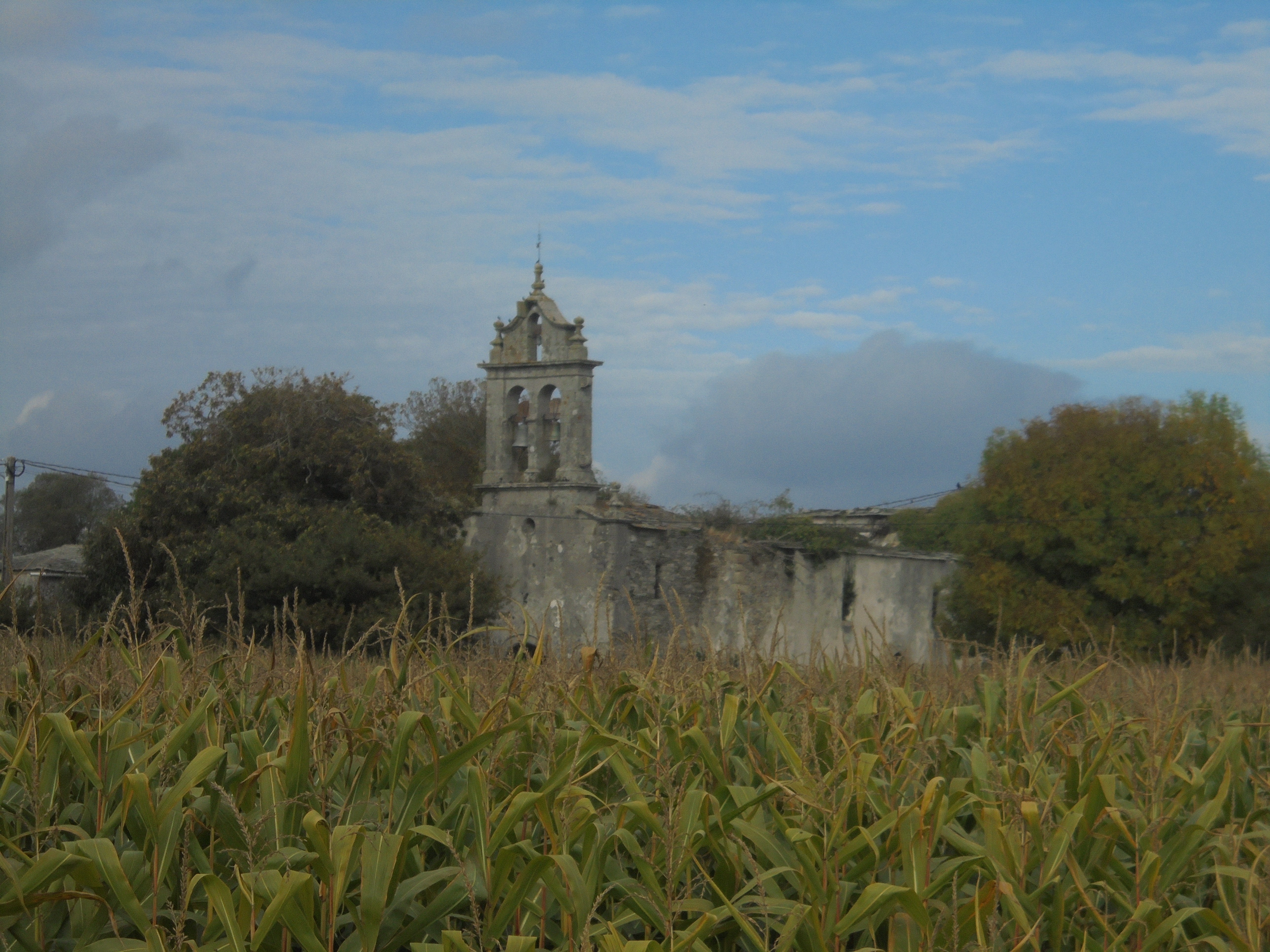 Igrexa de Caraño ( Pol)